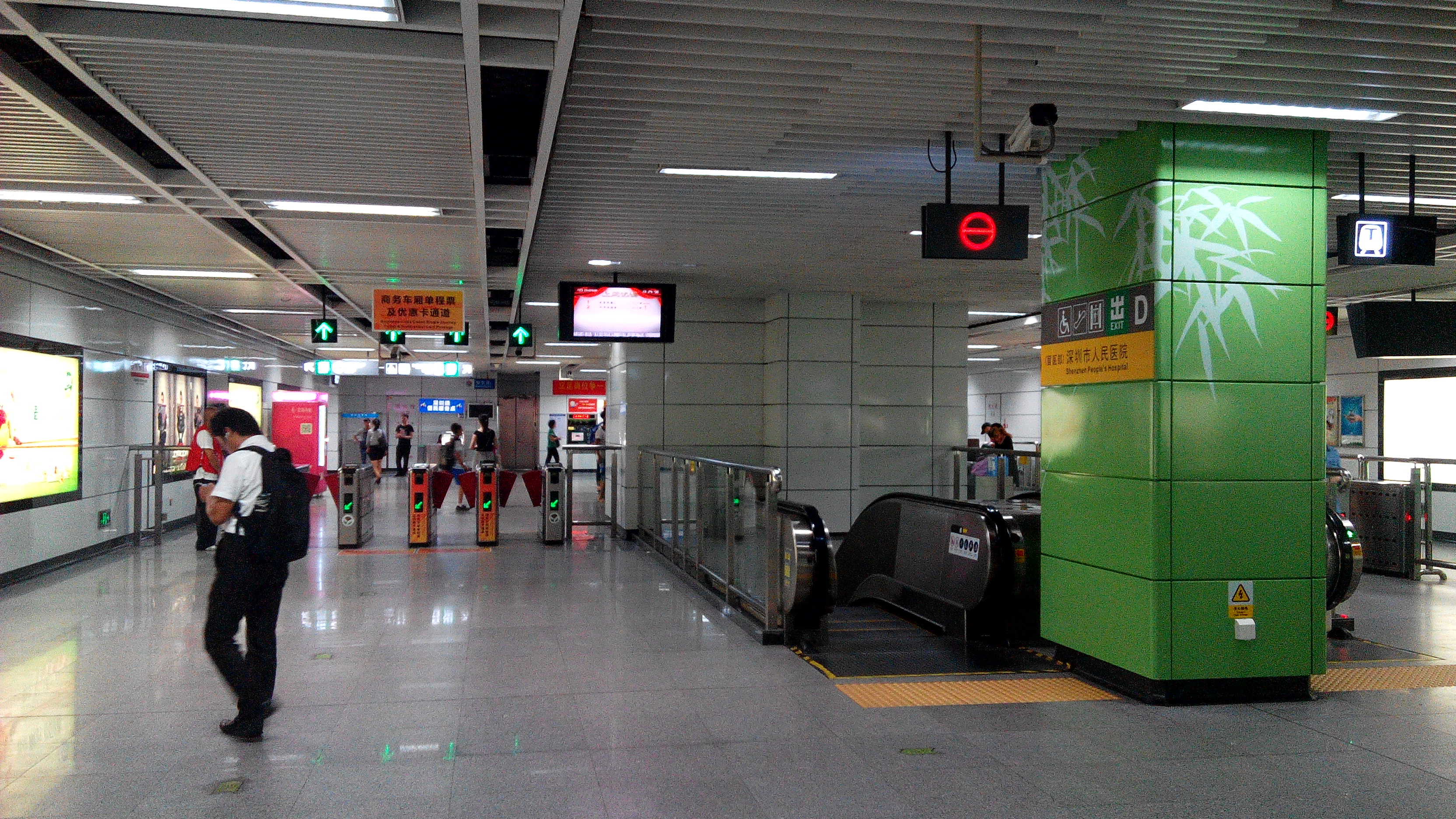 深圳地铁三号线 翠竹站大堂